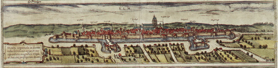 Ulm